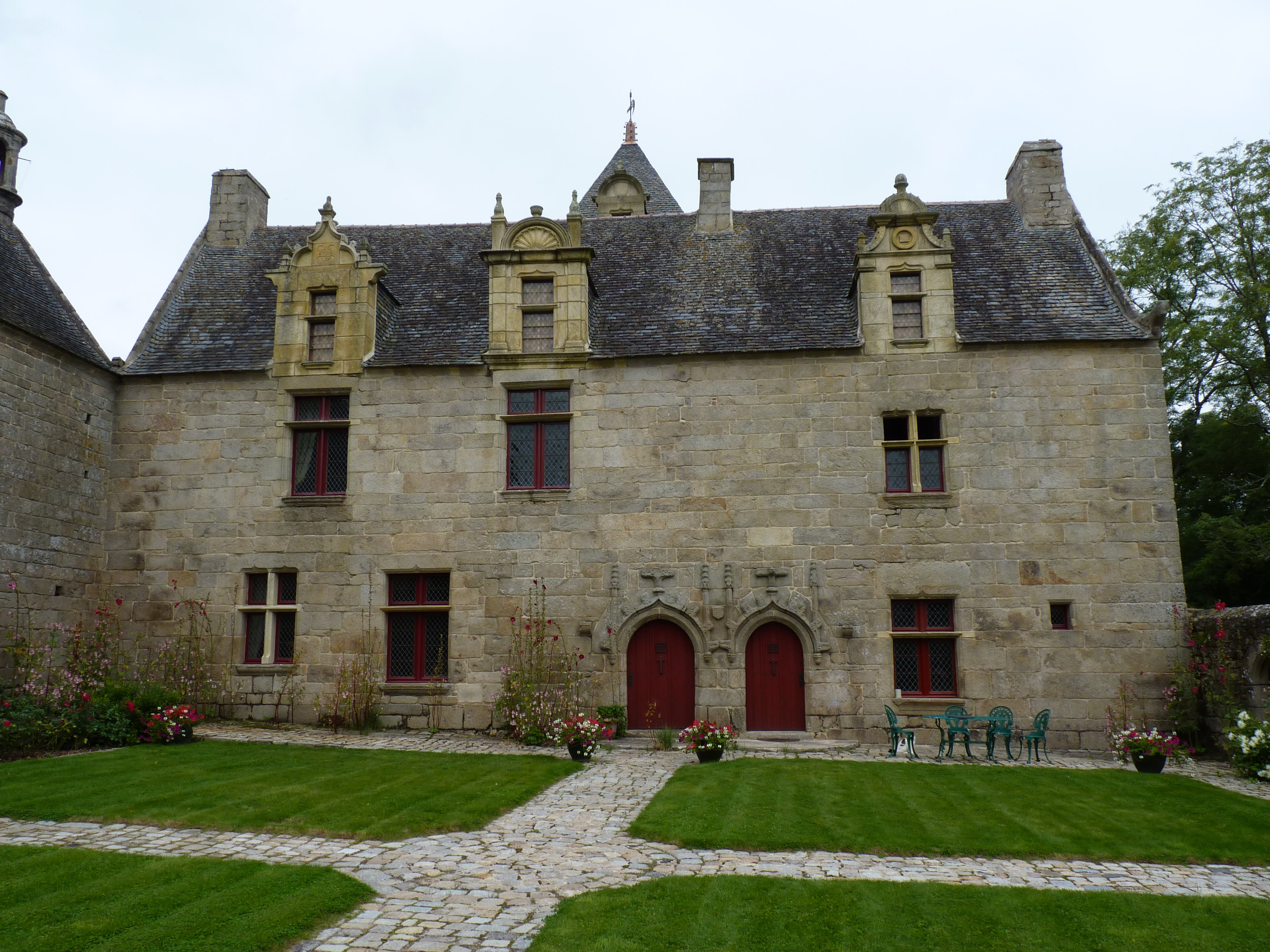 Façade du manoir. A gauche, grange à lin.